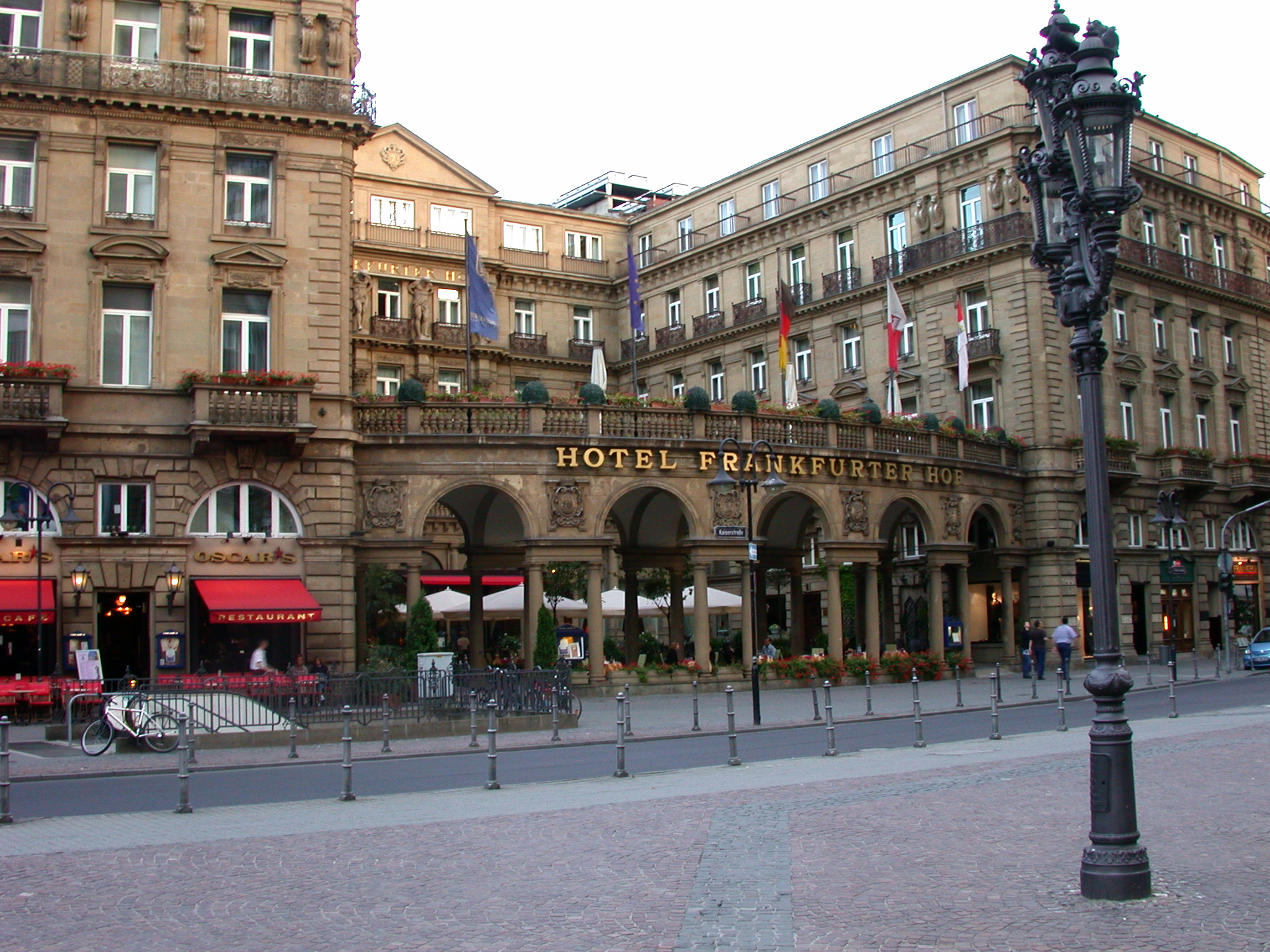 Titel: Hotel Frankfurter Hof am Kaiserplatz Ursprung: Selbst fotografiert am de:27. August de:2003 Rechte: GFDL